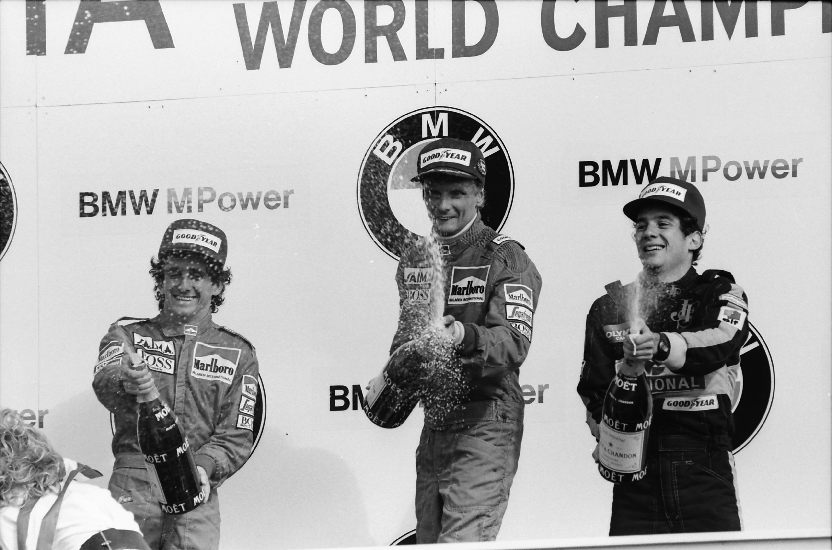 CollectieCollectie Fotoburo de BoerBeschrijvingHet podium na de laatste Formule 1-race in Zandvoort, met van links naar rechts Alain Prost, Nikki Lauda en Ayrton Senna.InventarisnummerNL-HlmNHA_1478_25453 K_22VervaardigerFotopersbureau de Boer TechniekFoto